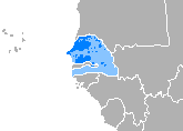 Idioma wólof